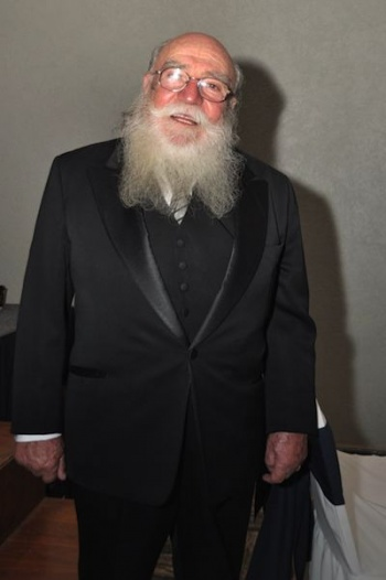 Actor de Doblaje Mexicano